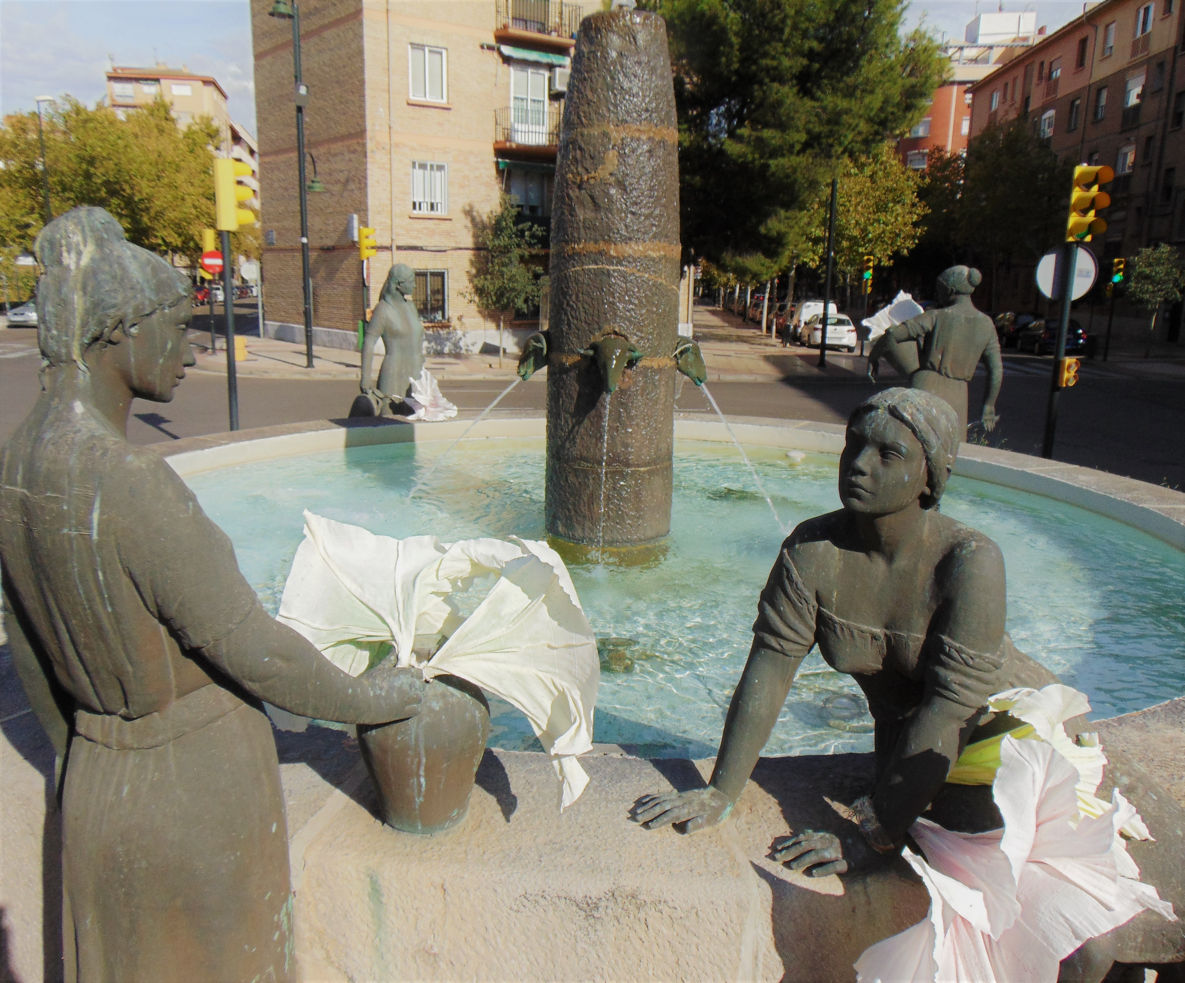 Obra de Luisa Granero.